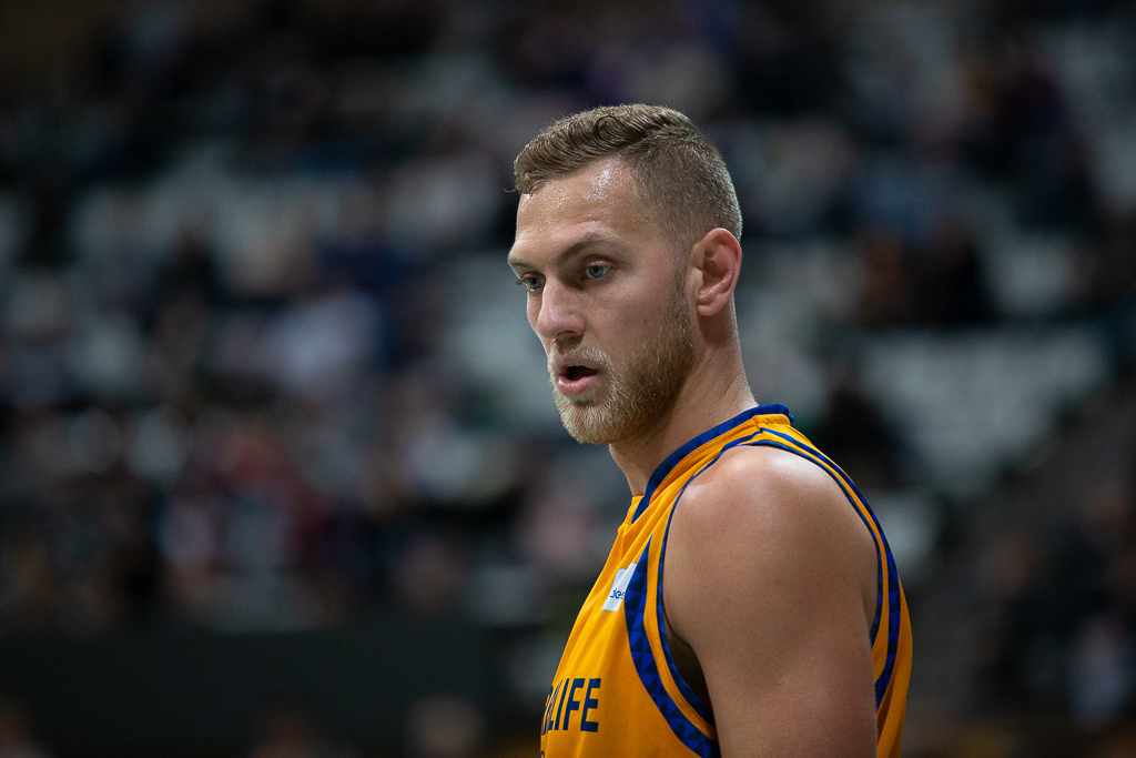 Siim-Sander Vene, jugador del Herbalife Gran Canaria en partido de liga contra el Divina Seguros Joventut en el Olímpic de Badalona.